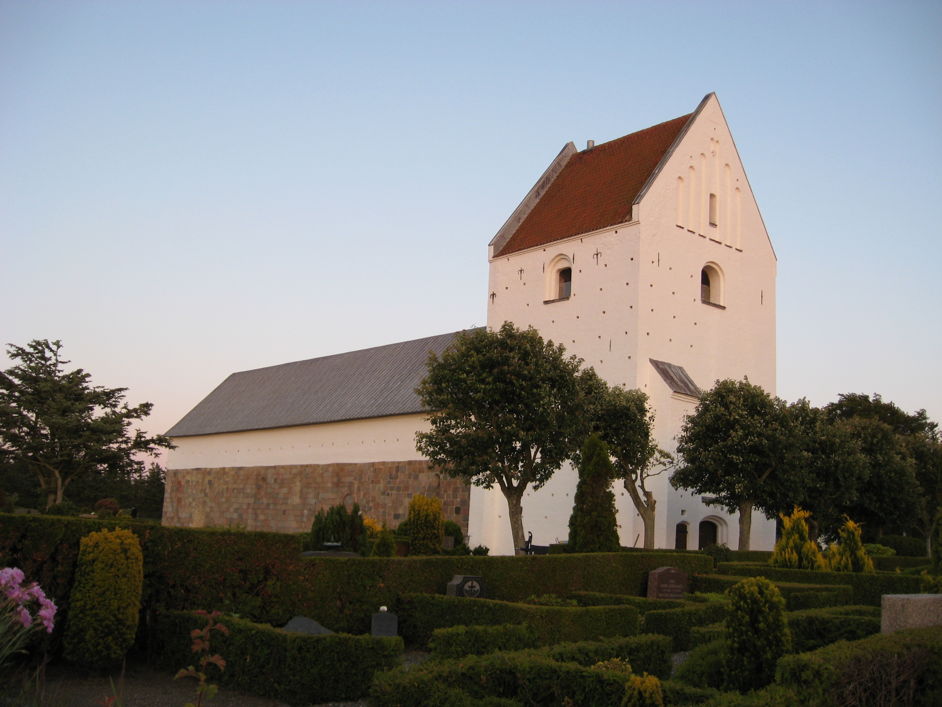 Saltum Kirke i Jammerbugt Kommune